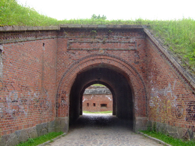 Giżycko (Lötzen) - Feste Boyen